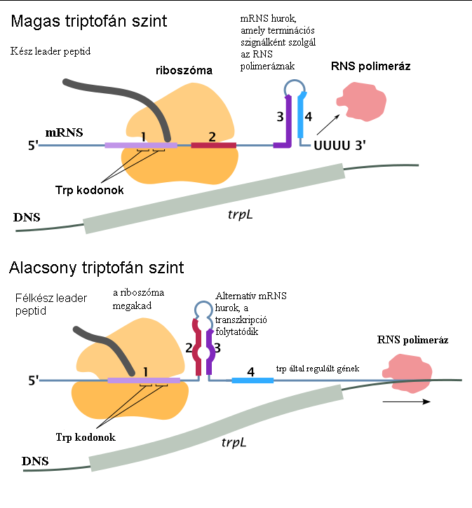 A triptofán operon transzkripciós attenuációja mRNS hurkok segítségével.